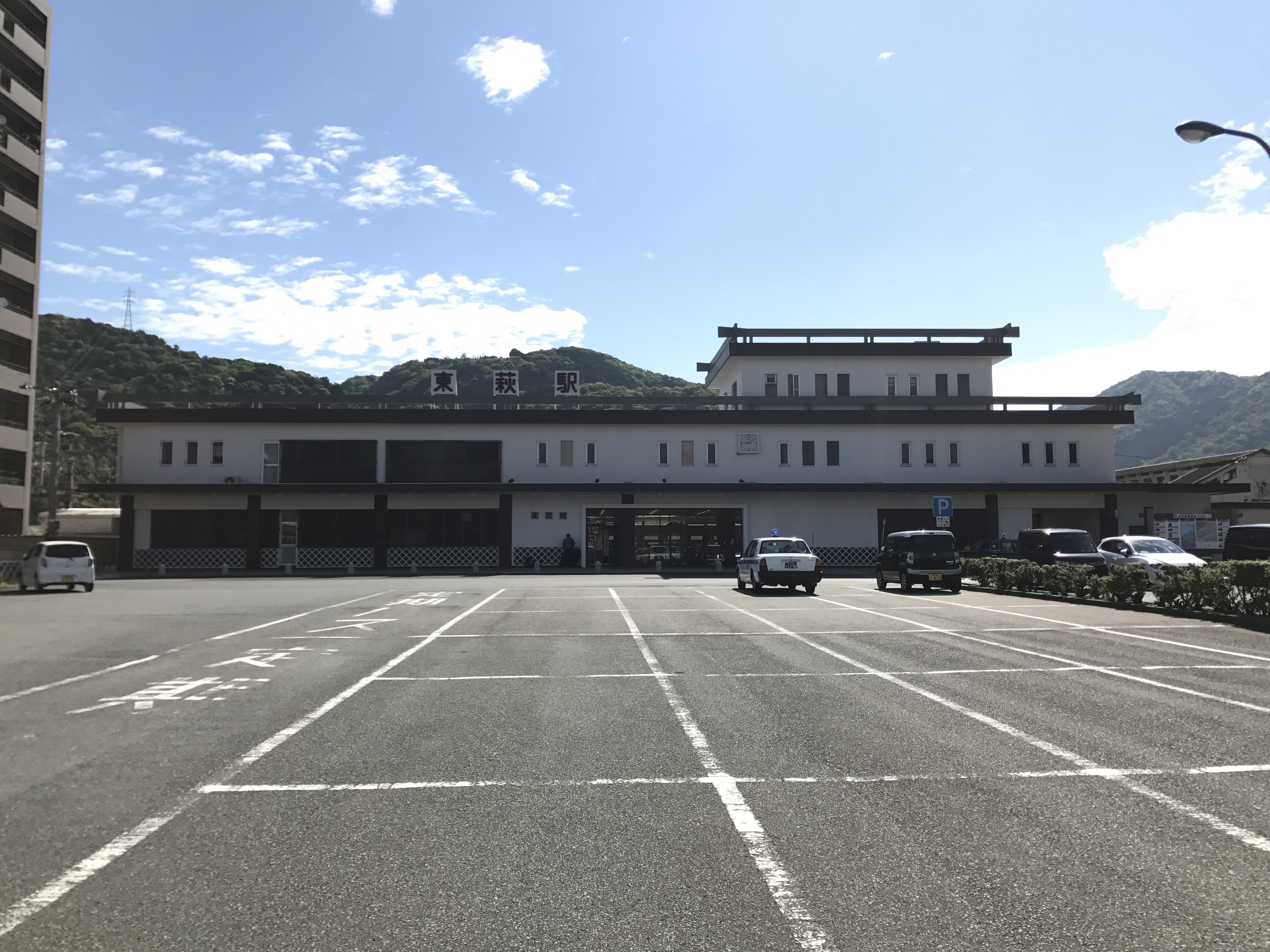 東萩駅駅舎